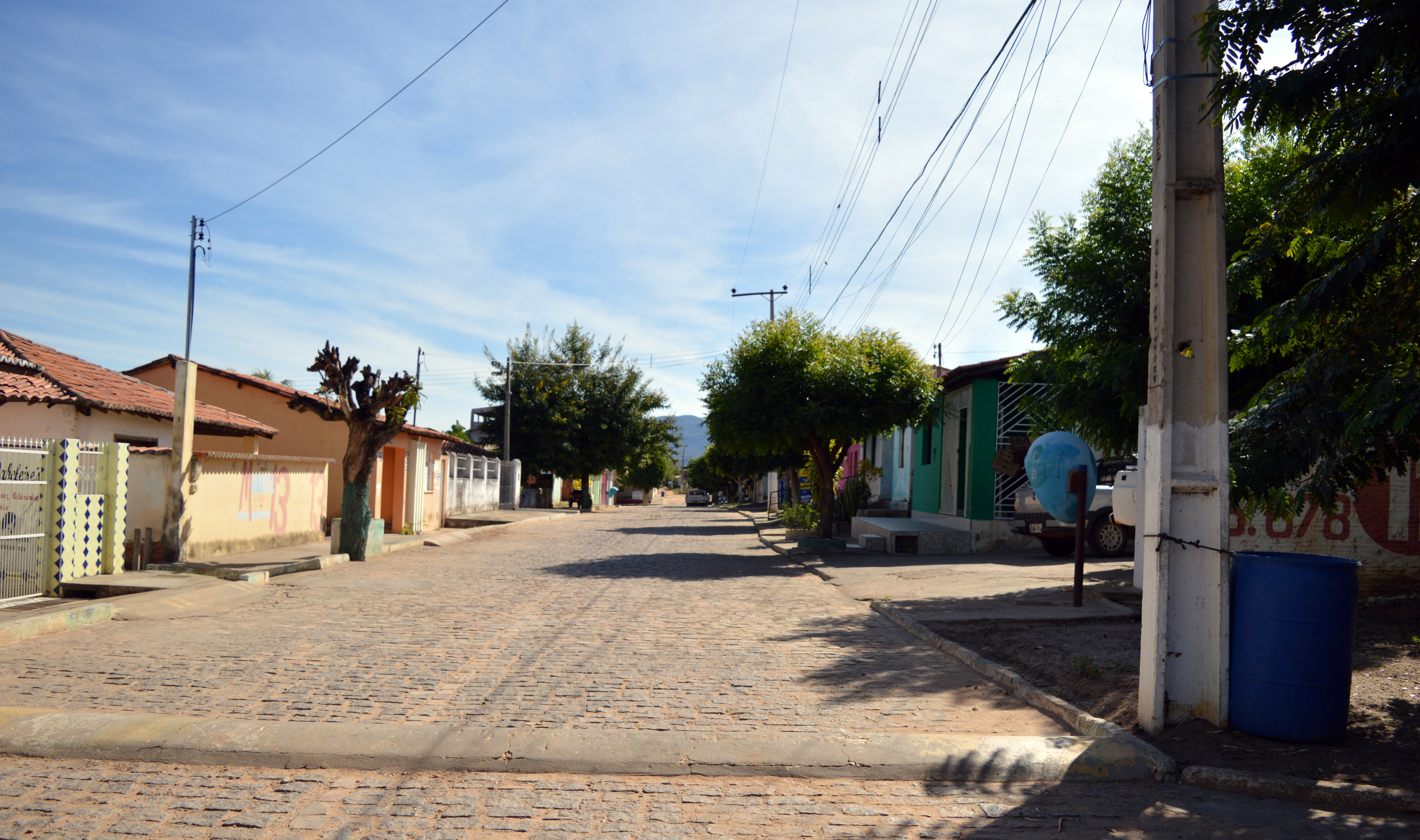 Estrada dentro do distrito de Águas do Paulista em Paratinga. Foto de 18 de janeiro de 2017.